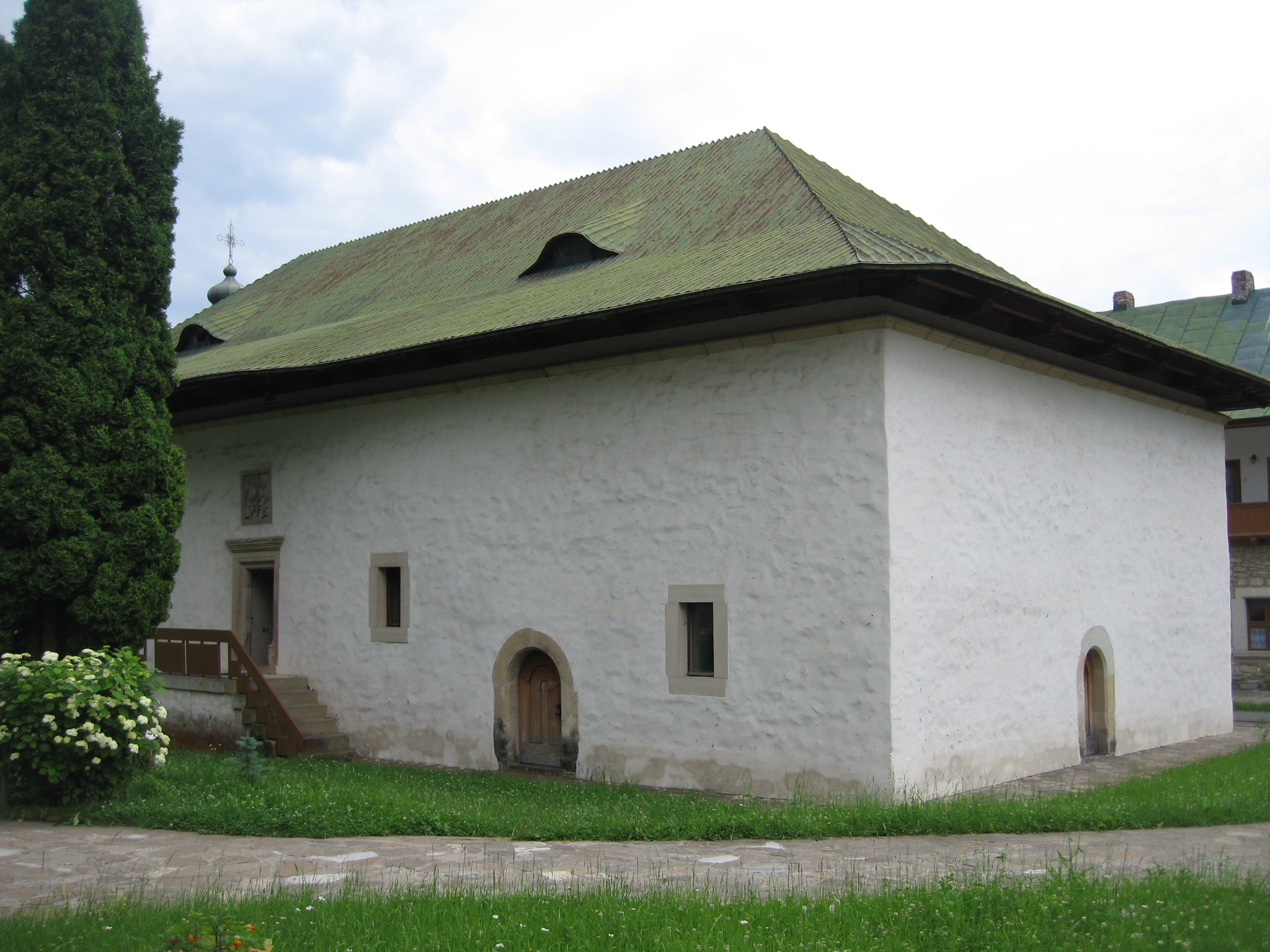 Mănăstirea Slatina